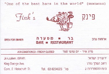 כרטיס הביקור של בר-מסעדה 'פינק'